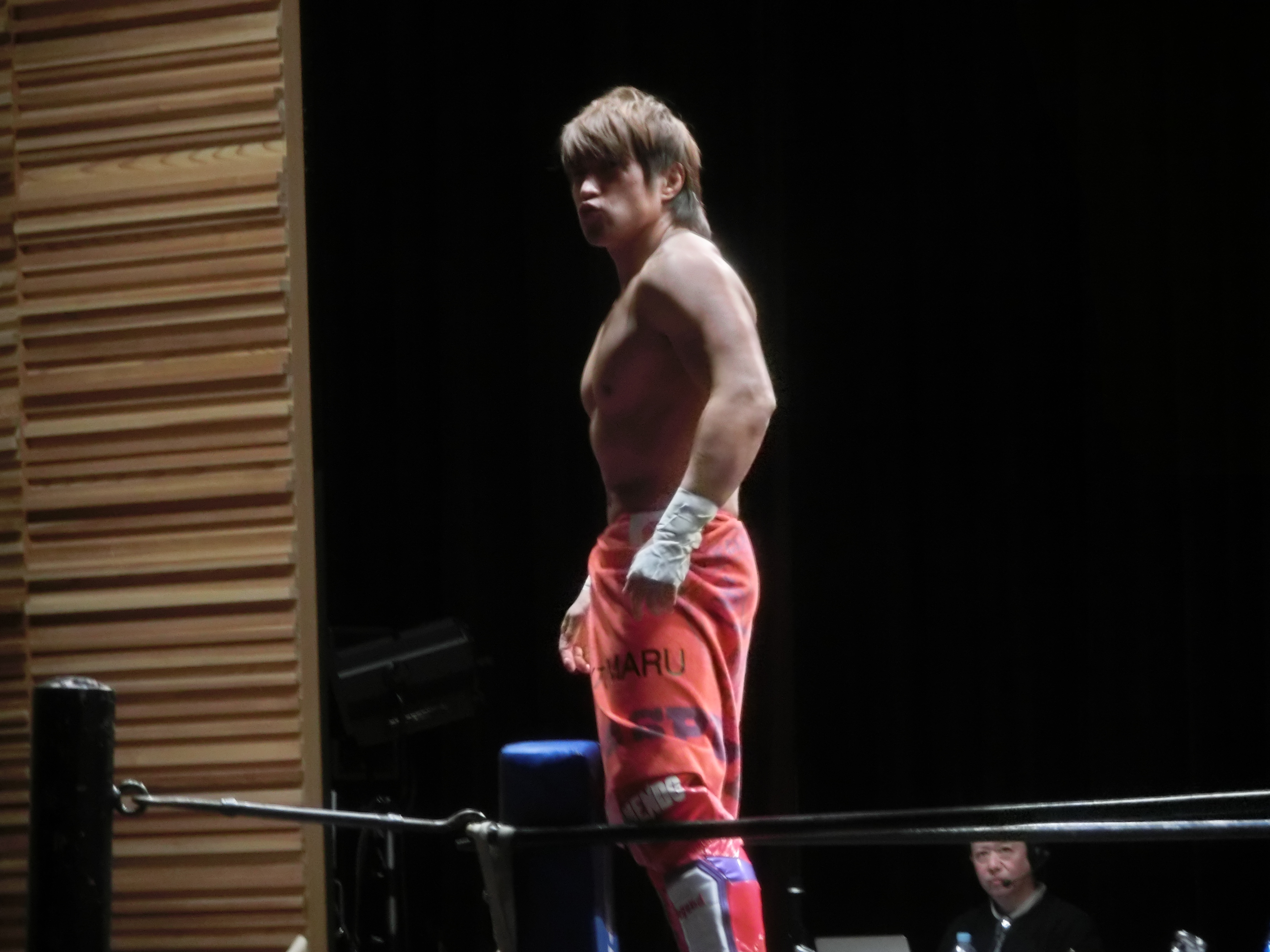 Masa Saito mourning performance